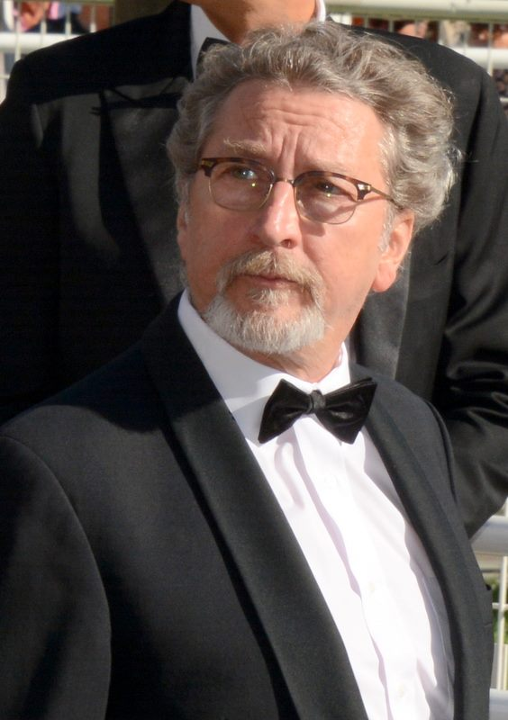 Robert Guédiguian au festival de Cannes